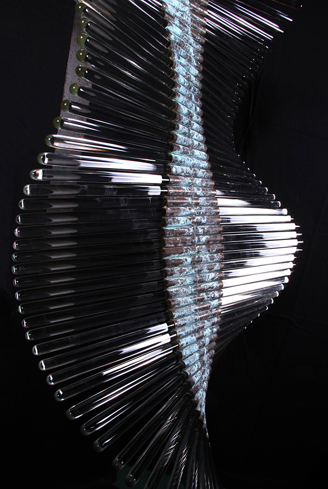 Thierry Bontridder - Evénement 7, 1994 (détail). Sculpture en cuivre, verre et acier. Dimensions : 140 x 70 x 58 cm.